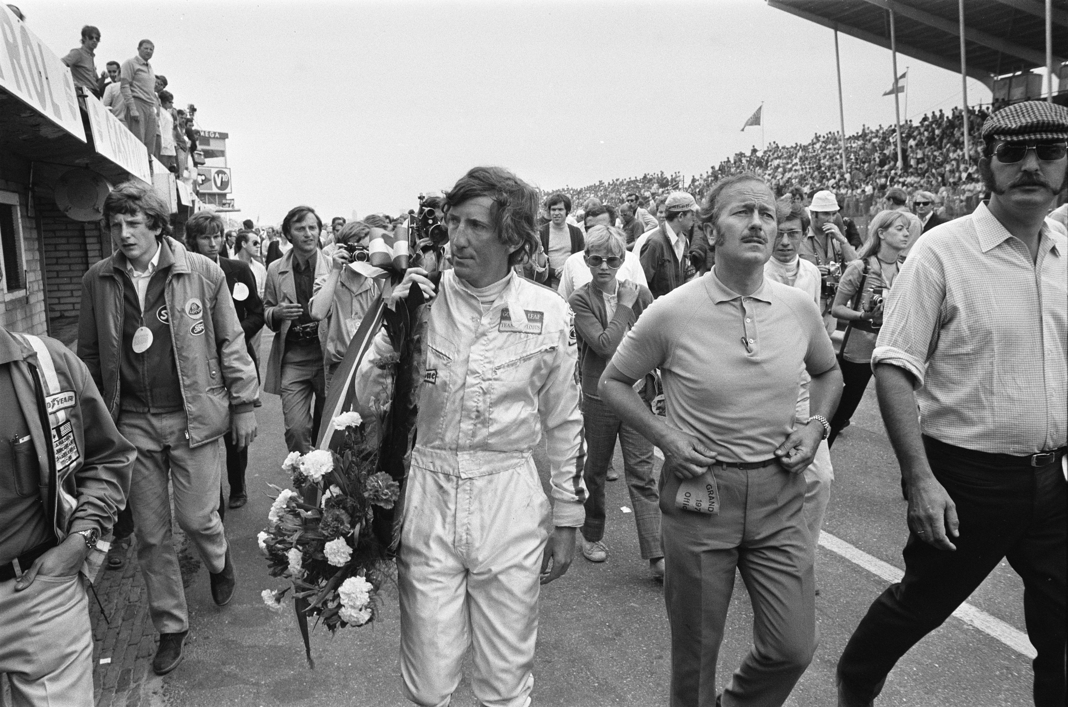 Grand Prix 1970 van Nederland voor Formule I wagens , Zandvoort; Jochem Rindt (links) met krans, rechts Lotus constructeur Colin Chapman.